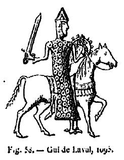 Gravure représentant le sceau de Gui de laval en 1095